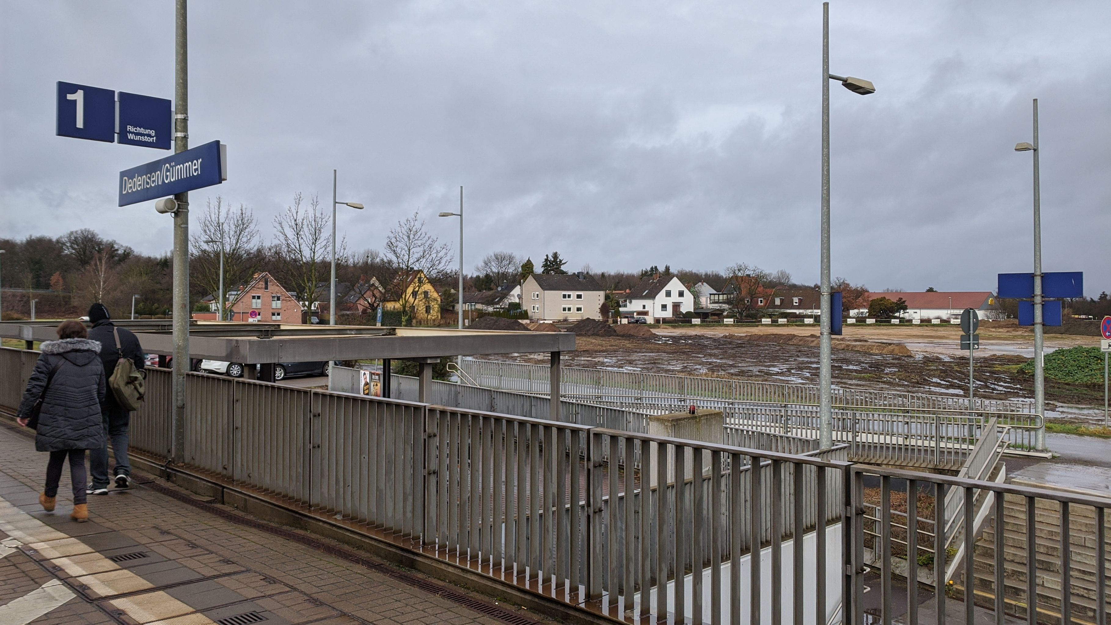 S-Bahn Hannover, Bahnhof Dedensen/Gümmer, Bahnsteig Richtung Wunstorf, Taken on 3 February 2020